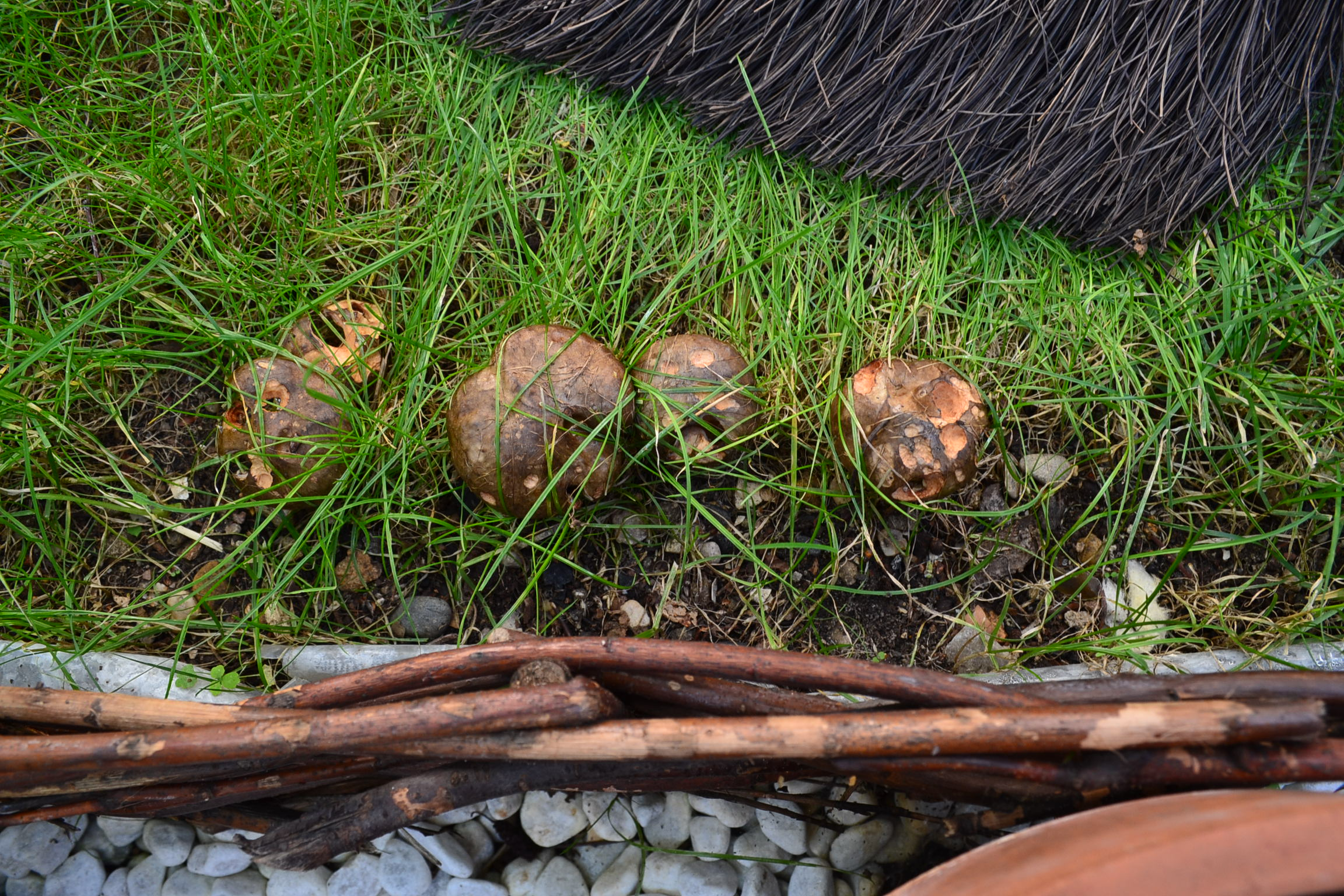 Plusieurs champignons vue du dessus.